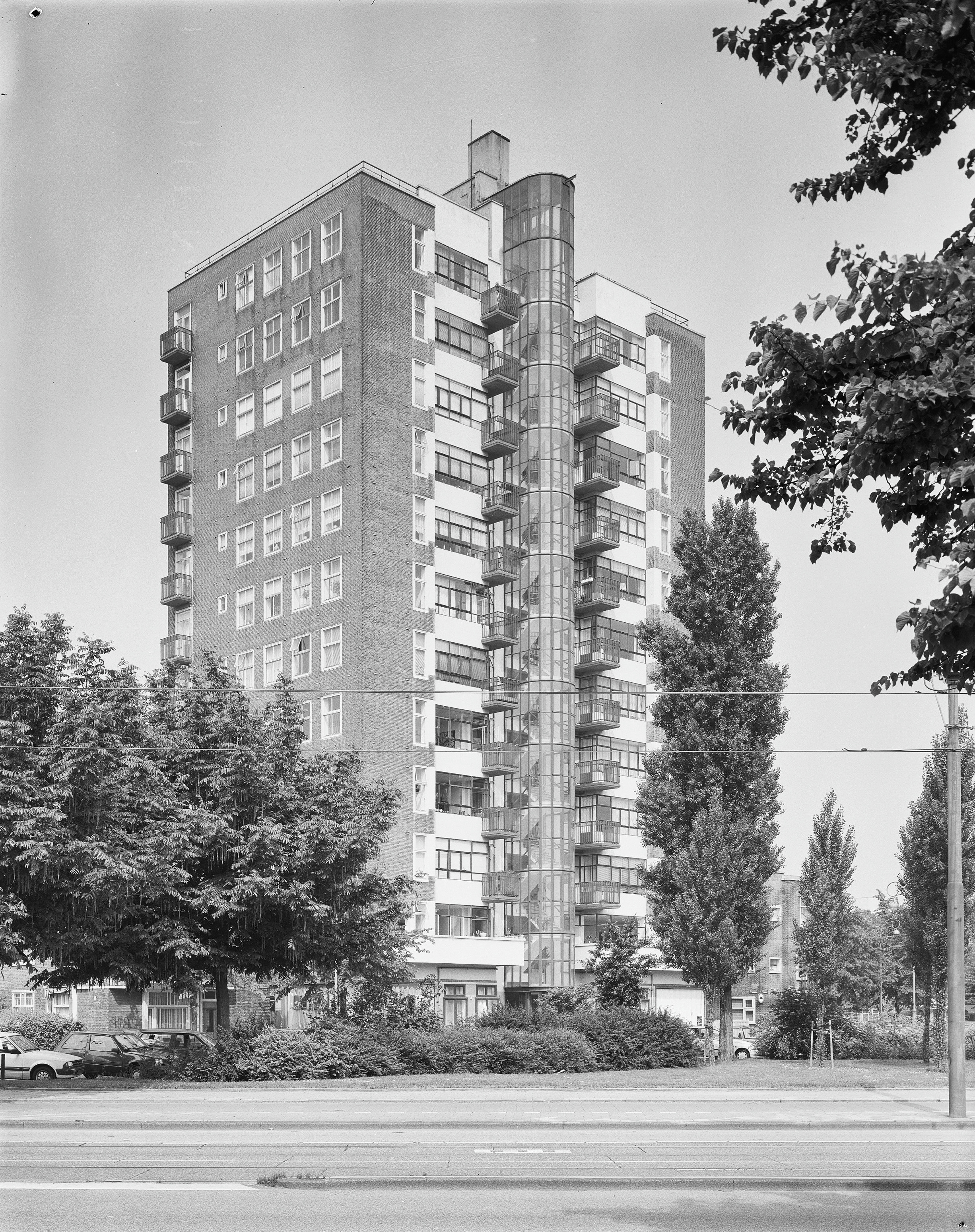 "DE WOLKENKRABBER": Exterieur VOORGEVEL, LINKER ZIJGEVEL